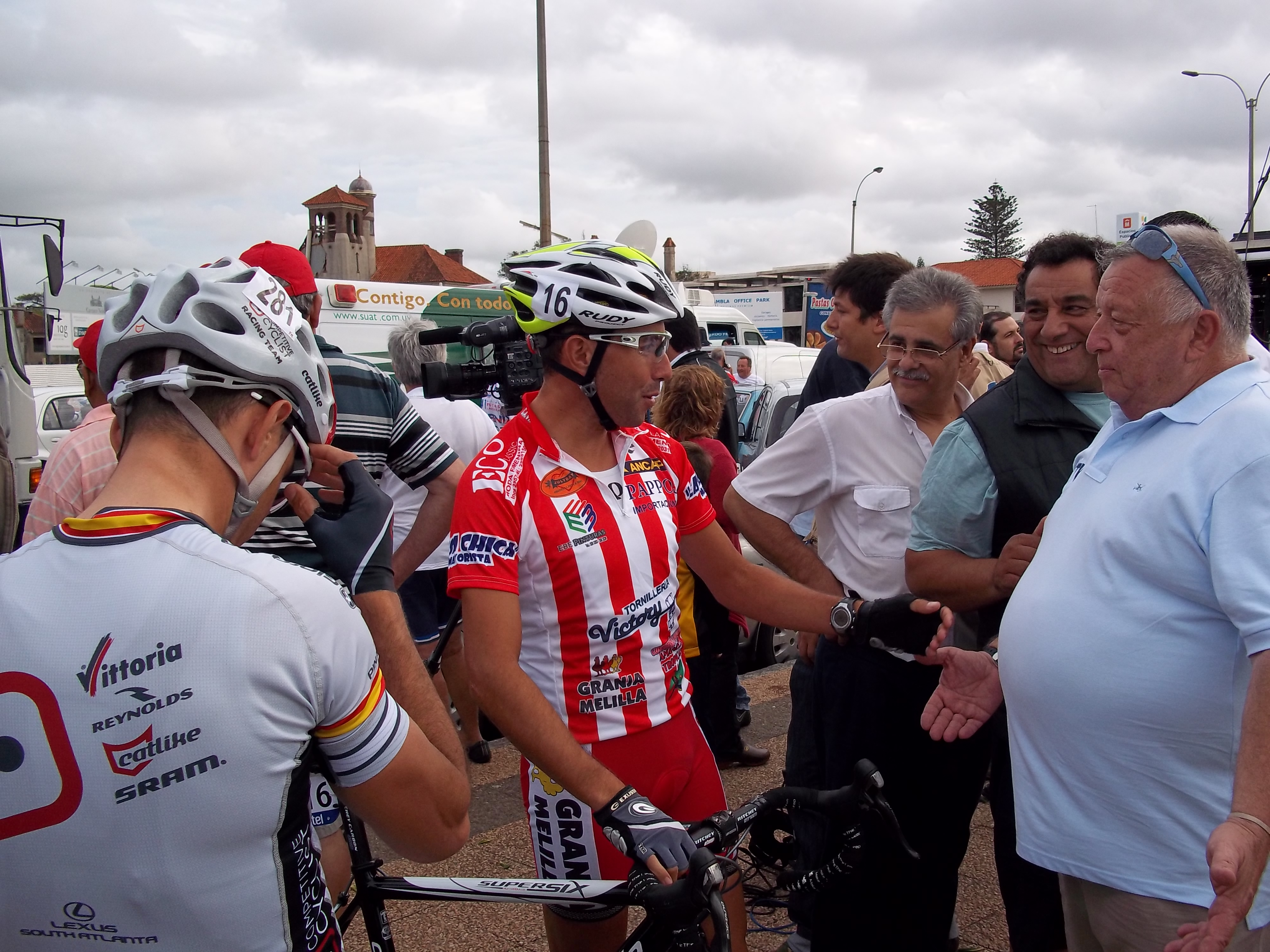 Inicio de Rutas de América 2012